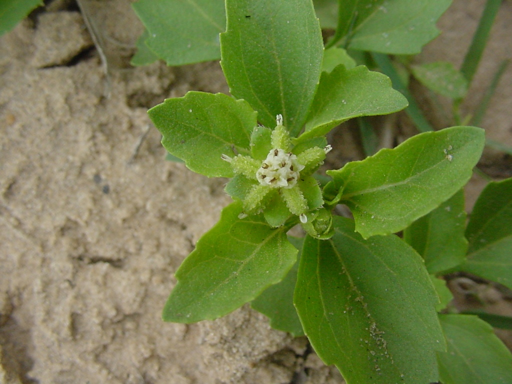 Acanthospermum australe - ASTERACEAE - Tavares ? RS - Brasil